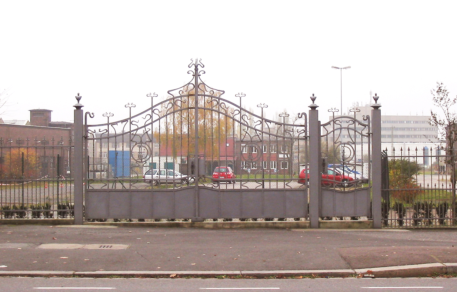 Radebeul, Chemische Fabrik v. Heyden, Gittertor an der Meißner Straße